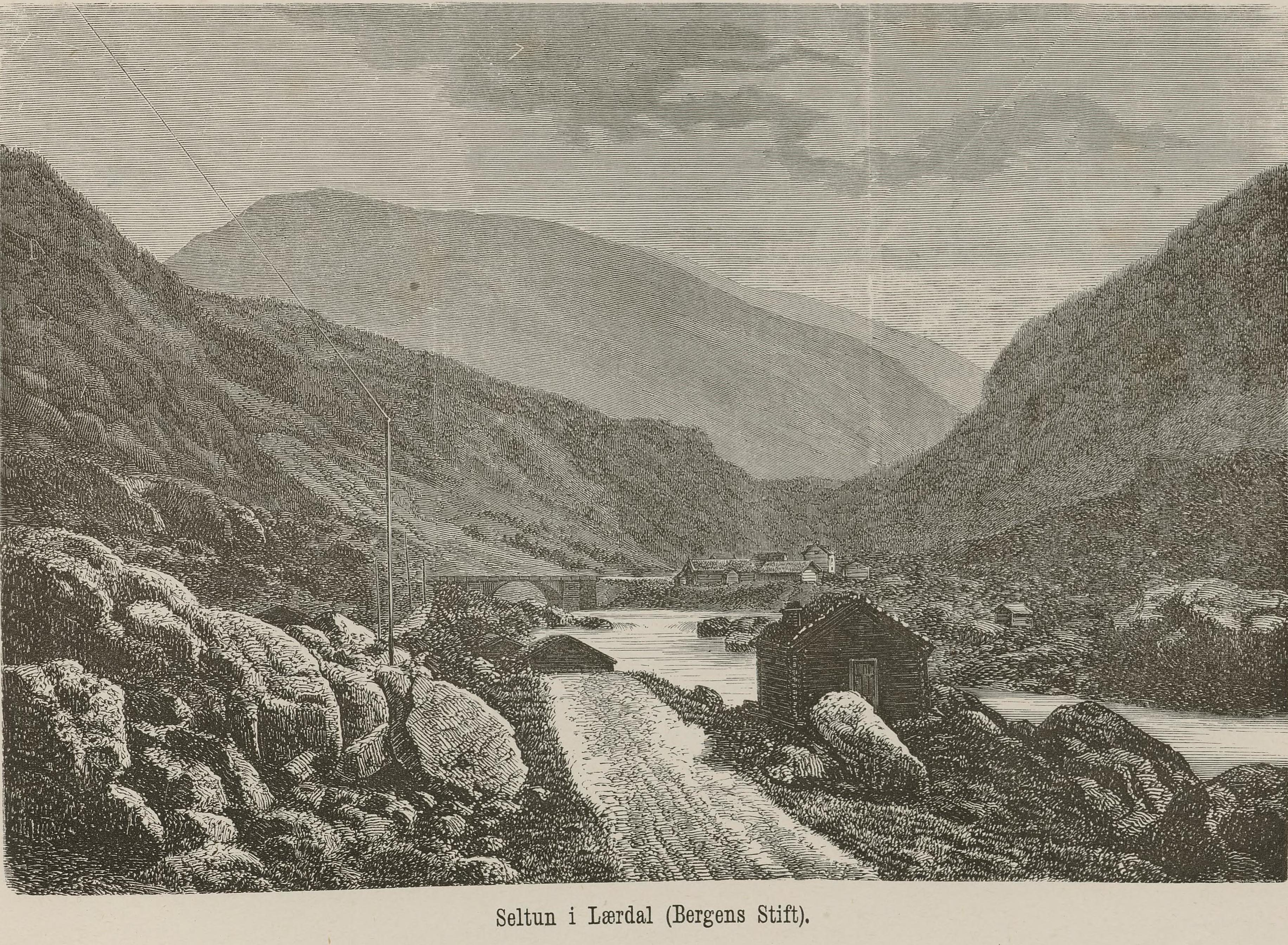 Illustrasjon hentet fra boken Nordiska taflor av ukjent forfatter og utgitt av Albert Bonnier (se, 1865)